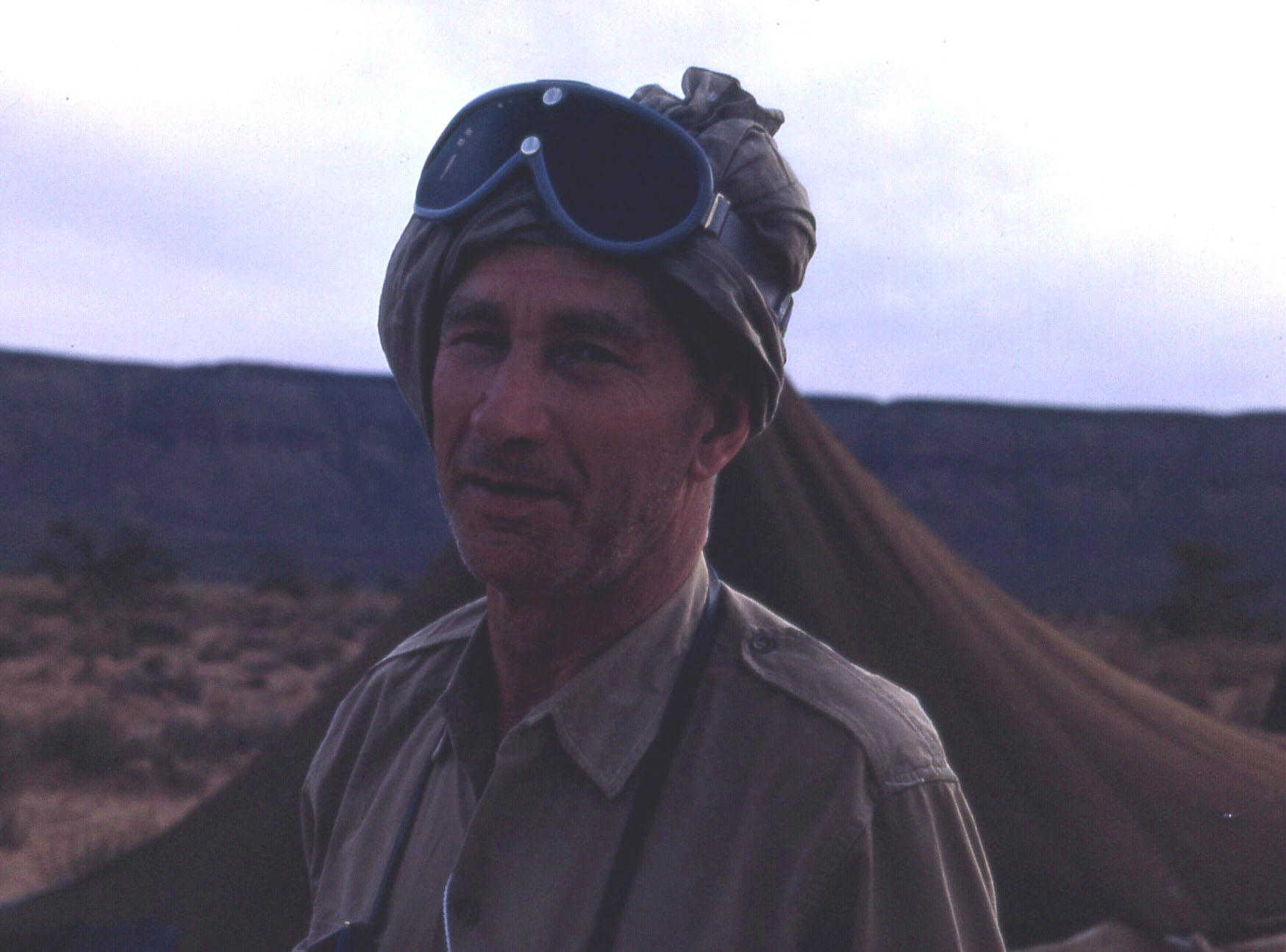 Henri Lhote in the Sahara Desert, Mauritania (photo légèrement retouchée pour améliorer les contrastes)